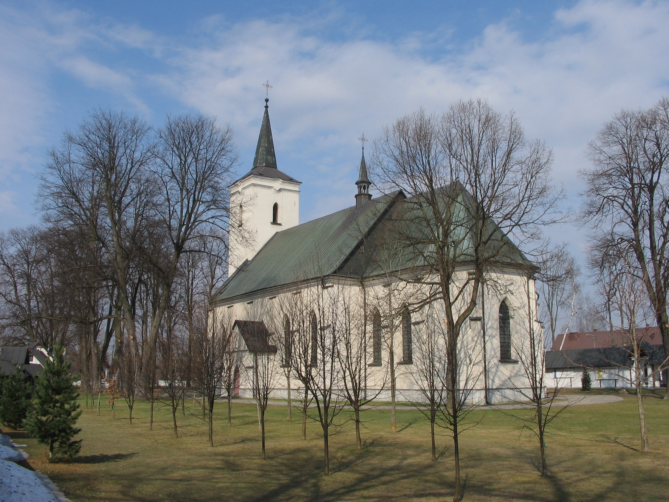 Ludźmierz - sanktuarium maryjne